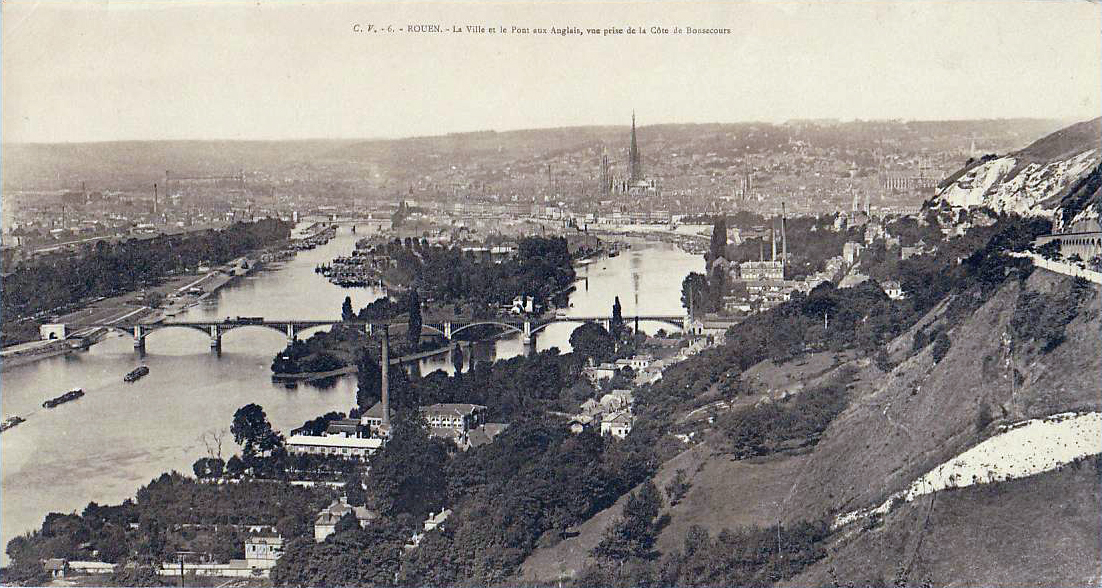 Carte postale ancienne de Rouen, Le Pont aux Anglais